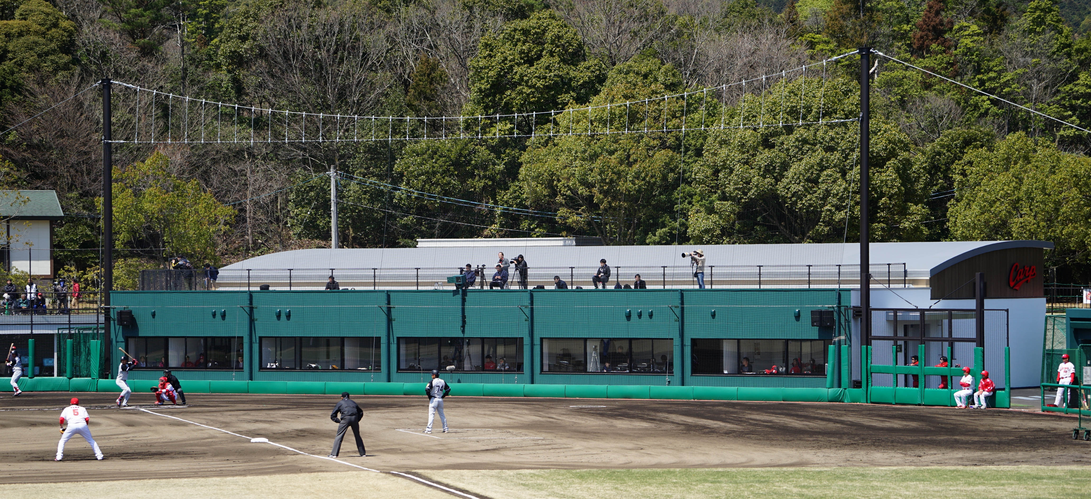 改装後の由宇練習場を本人撮影